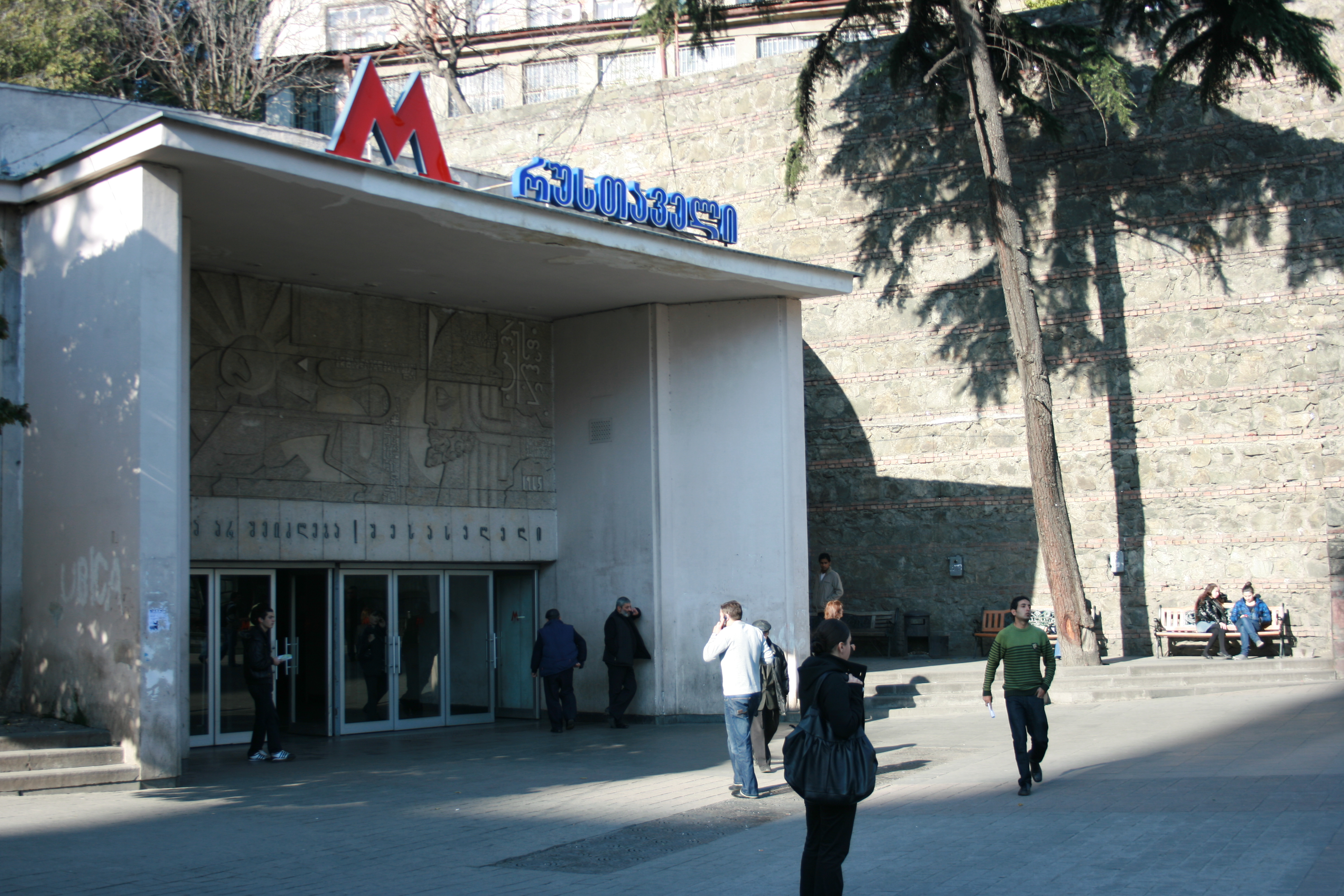 Вход на станцию метро Руставели.